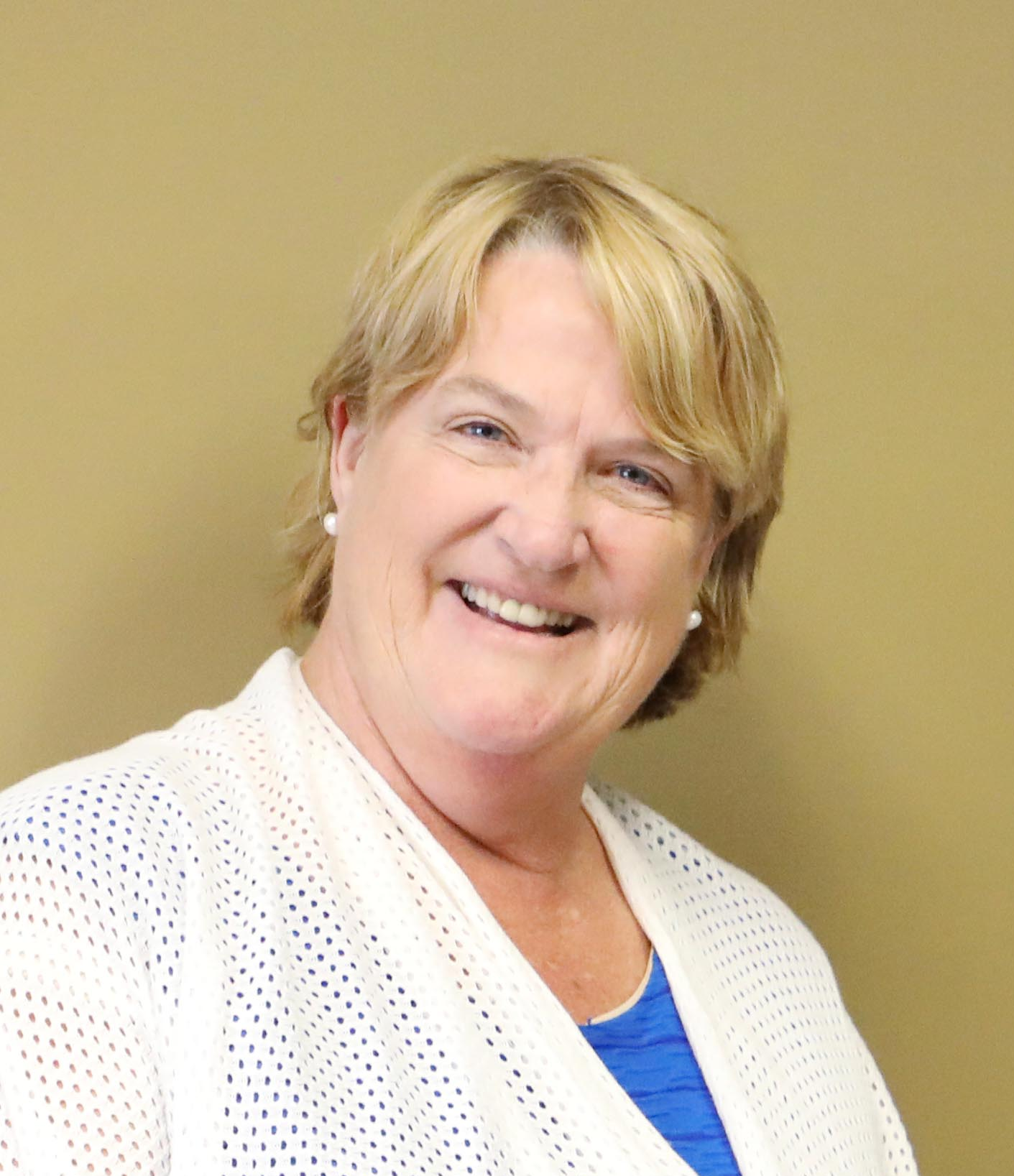 I was at the at The Kamloops Chamber of Commerce yesterday with my colleague Cathy McLeod in beautiful British Columbia. We met with business leaders and entrepreneurs to listen to their concerns. It's no secret that Justin Trudeau's tax hikes on local businesses and entrepreneurs will make it harder for Canadians to find a family doctor, result in layoffs, make life more difficult for farm families and make Canada a less competitive place to do business. Conservatives will keep standing up for local businesses and all those who depend on them. Hier, j’étais à la The Kamloops Chamber of Commerce avec ma collègue Cathy McLeod dans la belle Colombie-Britannique. Nous avons rencontré des dirigeants d’entreprise et des entrepreneurs afin d’écouter leurs préoccupations. Ce n’est un secret pour personne que les augmentations d’impôt de Justin Trudeau pour les entreprises et les entrepreneurs locaux feront en sorte qu’il sera plus difficile pour les Canadiens de trouver un médecin de famille, causeront des mises à pied et rendront la vie plus difficile pour les familles agricoles et le Canada moins concurrentiel. Les conservateurs vont continuer à défendre les entreprises locales et tous ceux qui en dépendent.